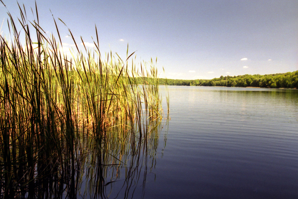 Friedvolle Sicht auf den Tornowsee,Ruppiner Schweiz in Brandenburg. Autor:Dieter Weiher (selbst). Das Bild wurde im Sommer 2004 aufgenommen mit einer Spiegelreflexkamera Dynax 7 von Minolta,Tamron-Aspherical-Zoom Objektiv 28-300 mm bei Blende 8 mit UV-Filter. Film Kodacolor Gold 400 ASA.